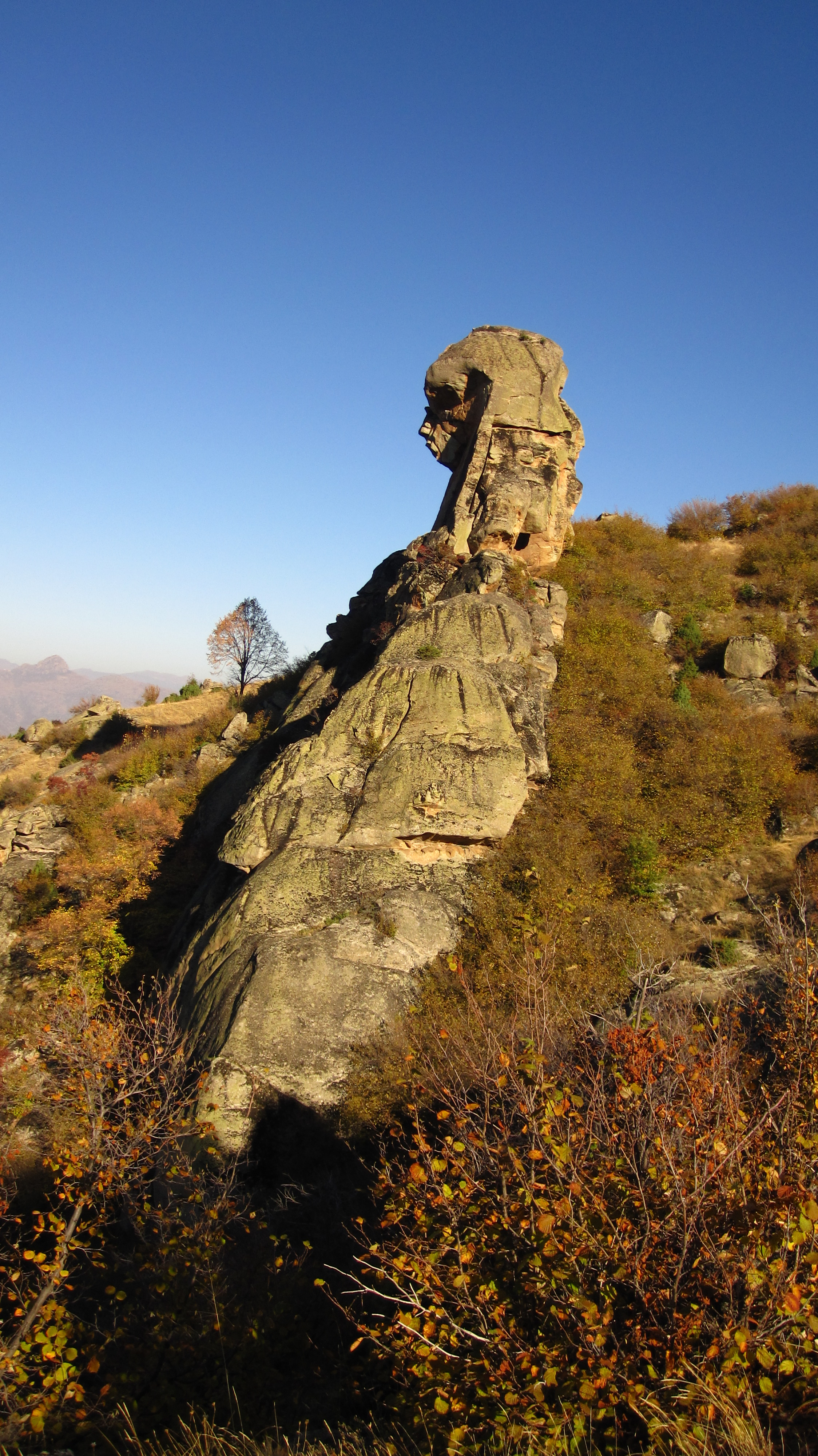 Карпата „Мома“ (сликана од нејзина лева страна) се наоѓа на Селечка Планина над с. Селце, Прилеп.